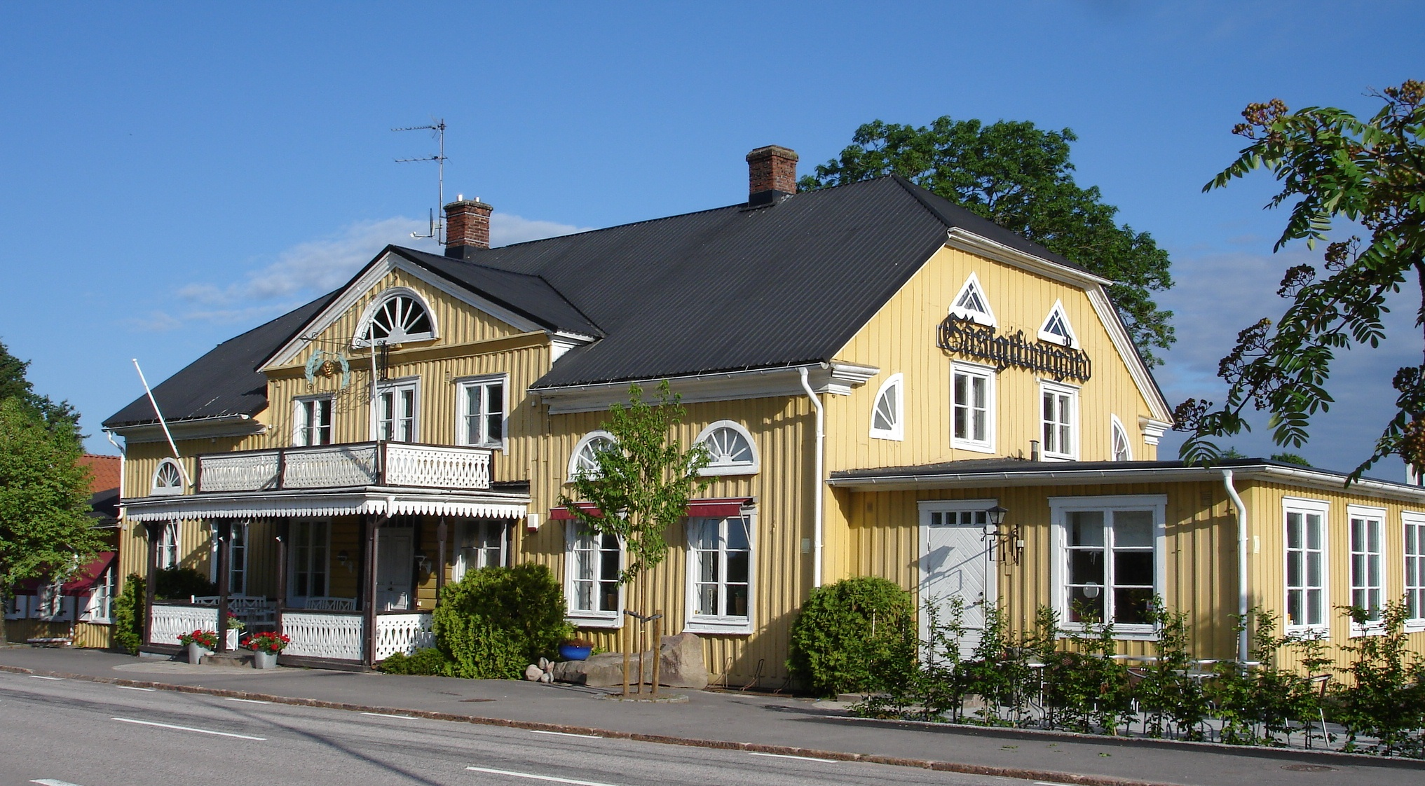 Det gamla Gästgiveriet mitt i Torups samhälle, Halland